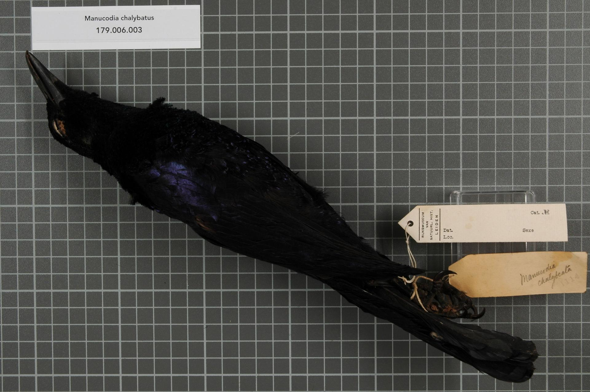 Manucodia chalybatus Pennant, 1781